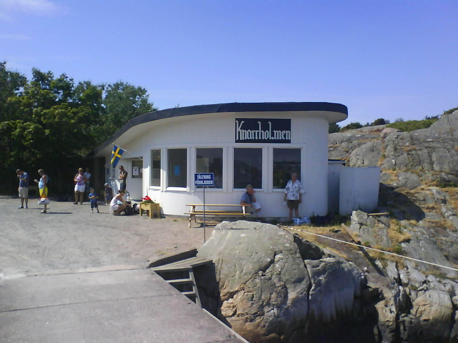 Väntkuren vid hamnen på Knarrholmen, Göteborgs södra skärgård